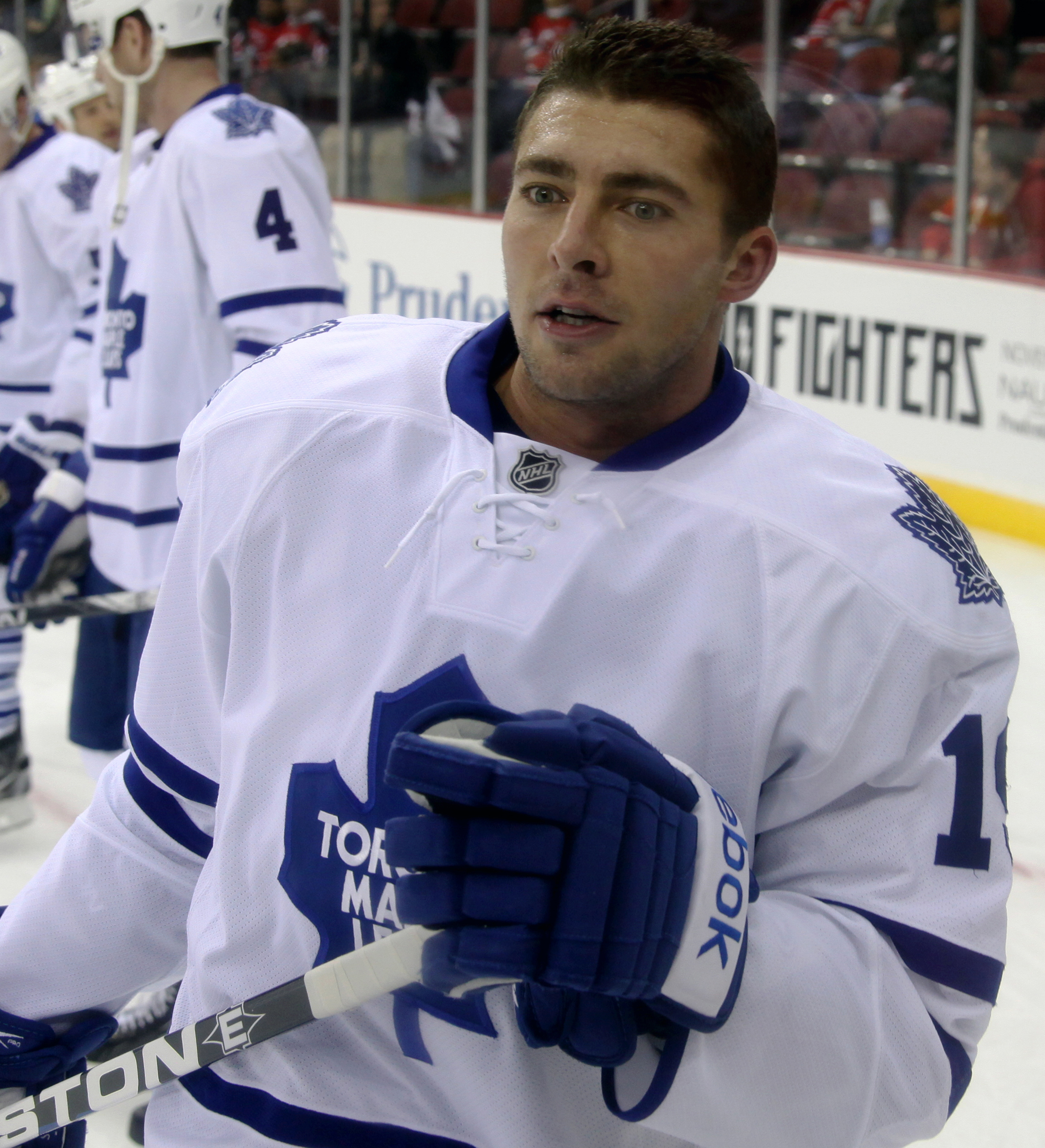 Lupul in 2011.